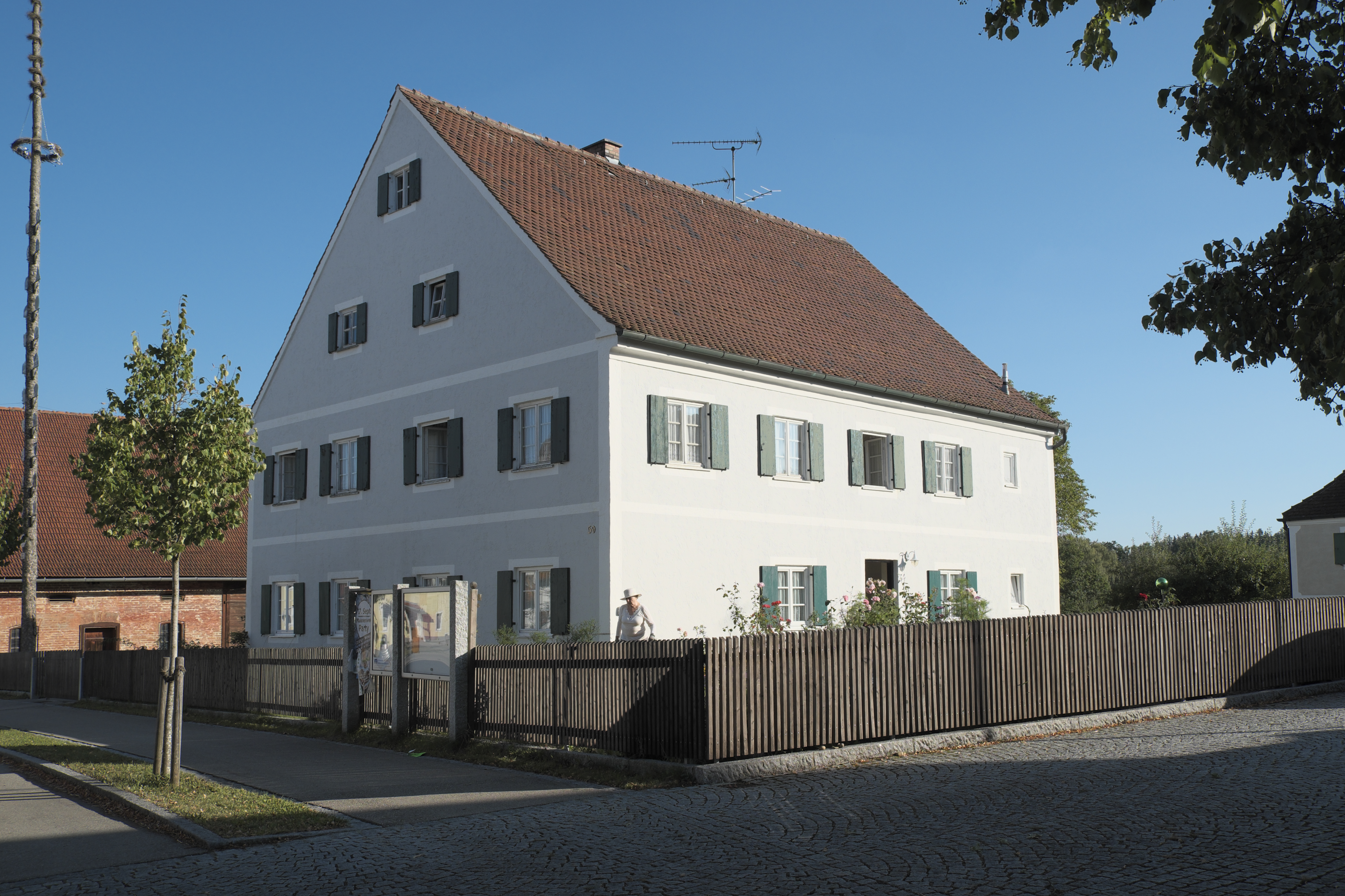 Ehemaliges Pfarrhaus in Dünzelbach (Moorenweis) im Landkreis Fürstenfeldbruck (Bayern/Deutschland)